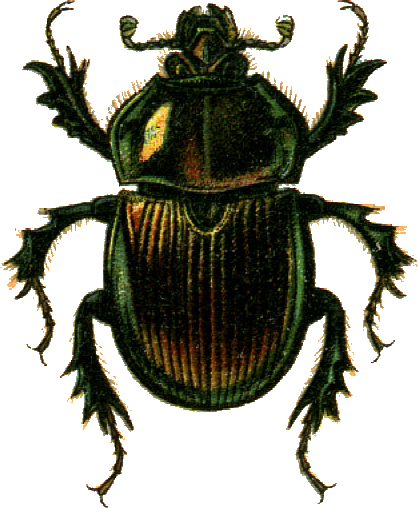 This file has been extracted from another file: Jacobs27.jpg